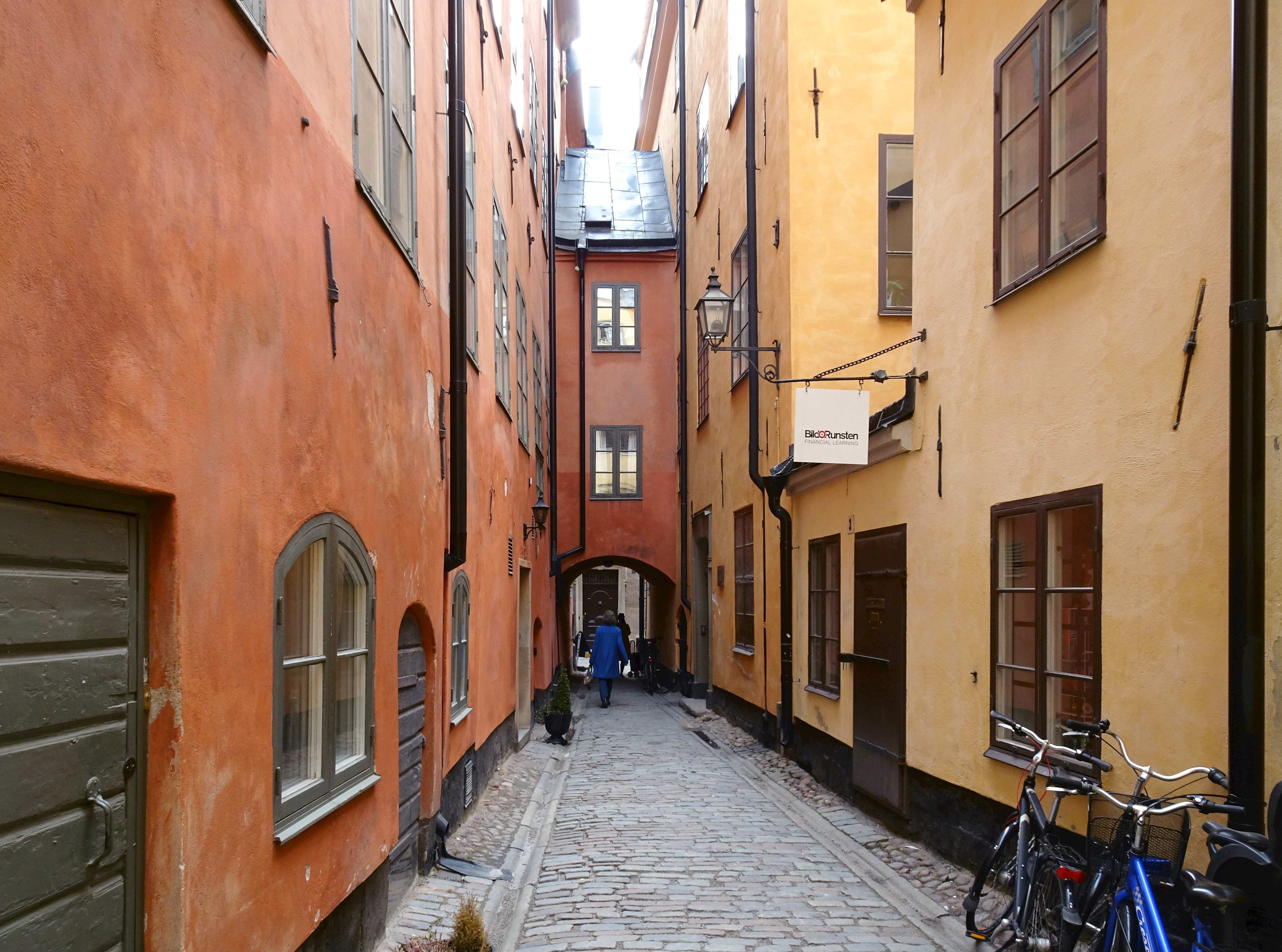 Skeppar Olofs gränd, mot söder